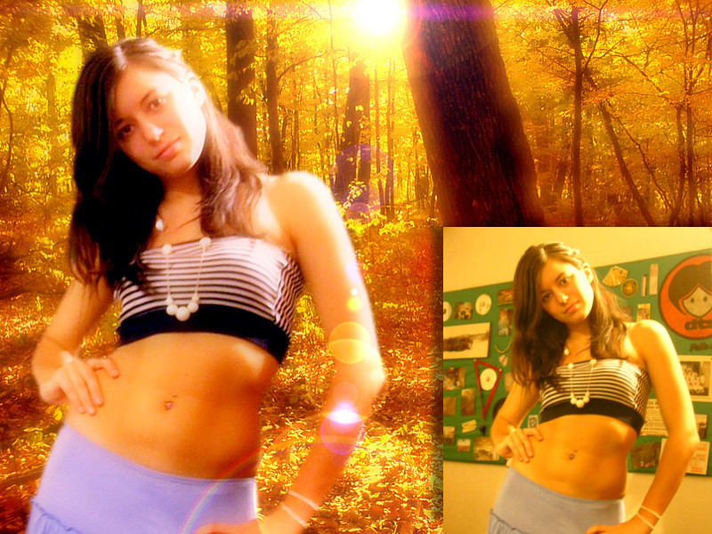 Ejemplo de retoque fotografico y collage.